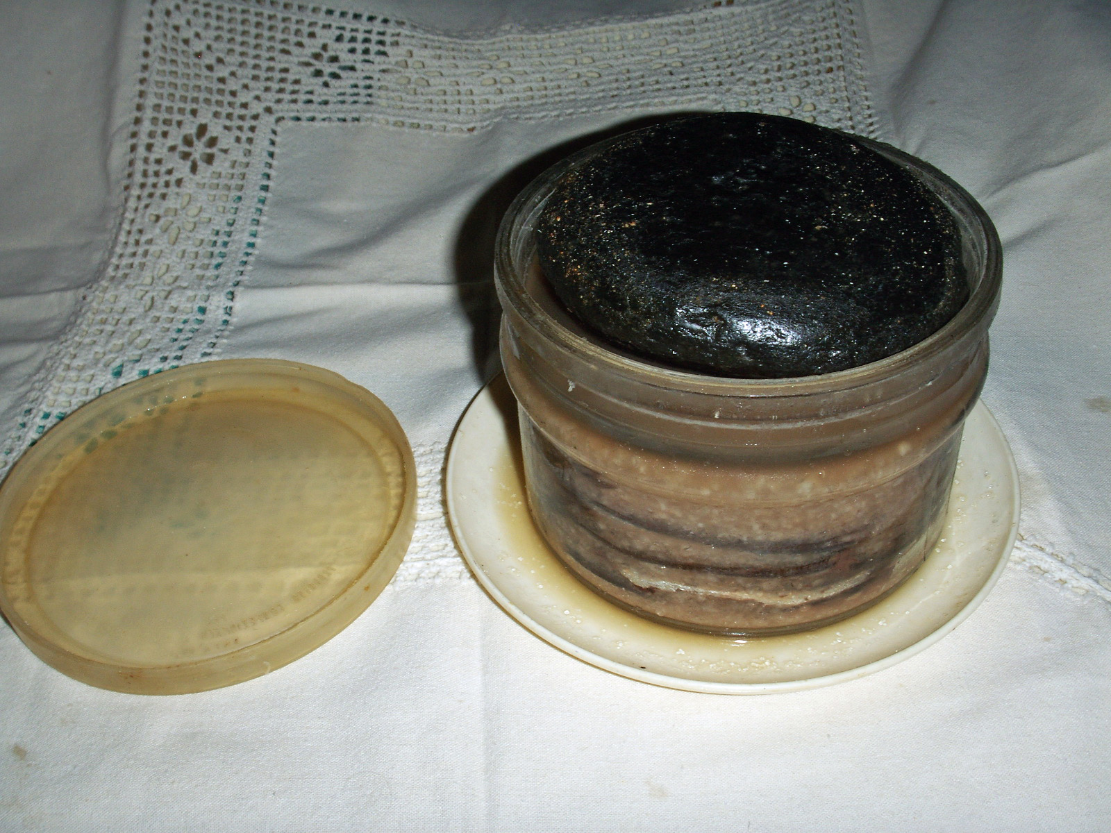 arbanella di acciughe mature